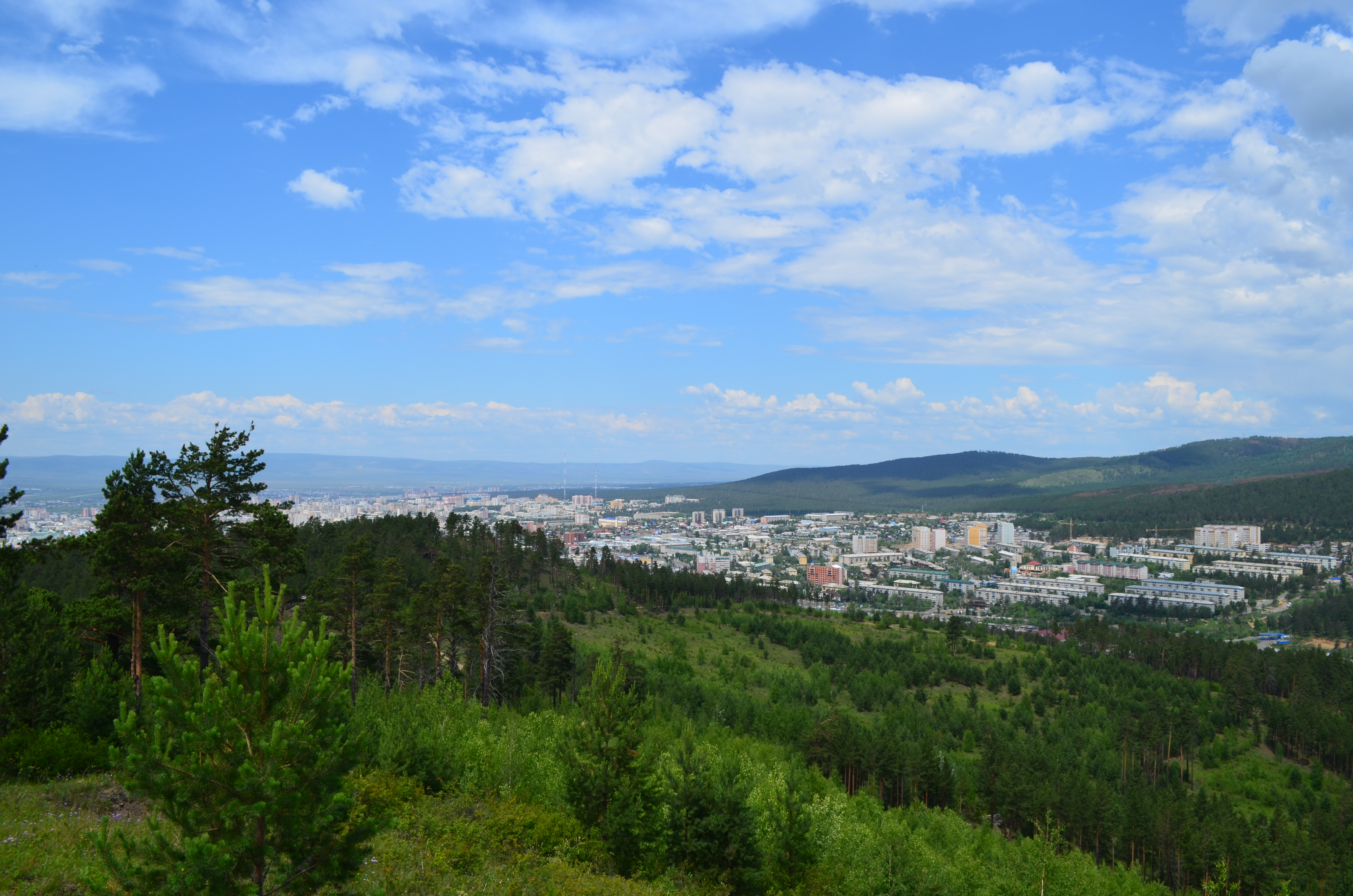 снимки конца июня - начала июля 2015 г.